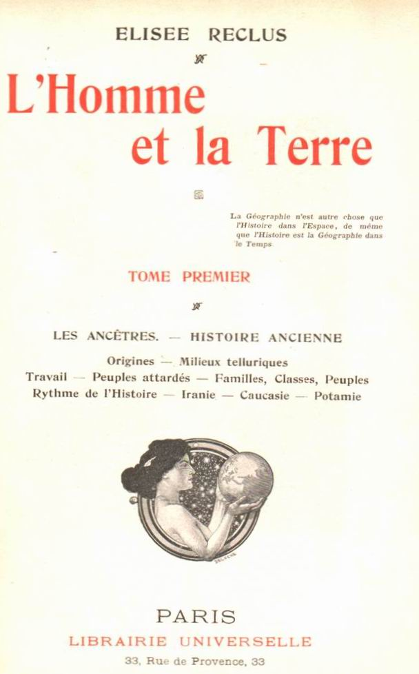 Première page de L'Homme et la Terre